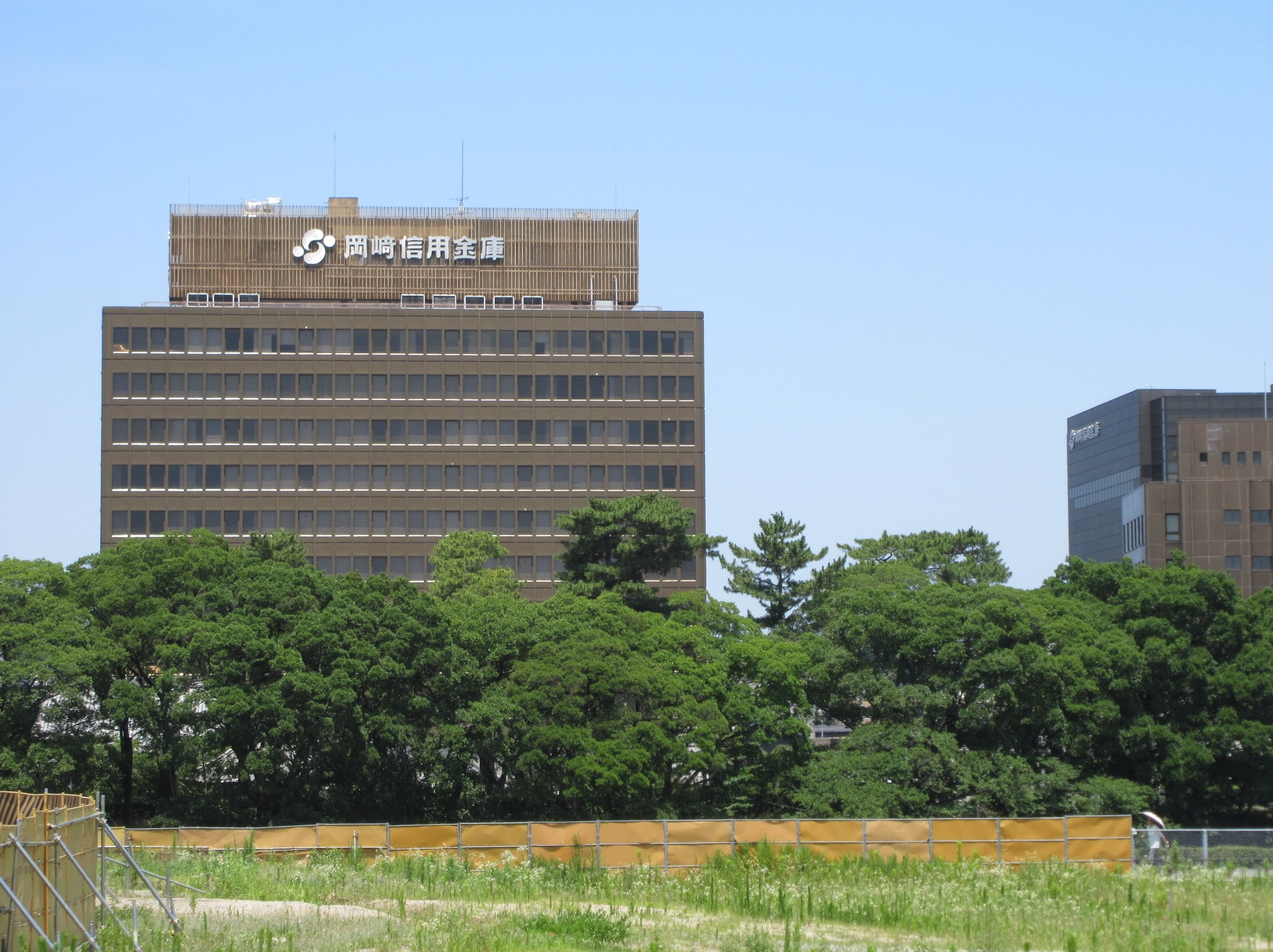 岡崎信用金庫本店（岡崎市菅生町）